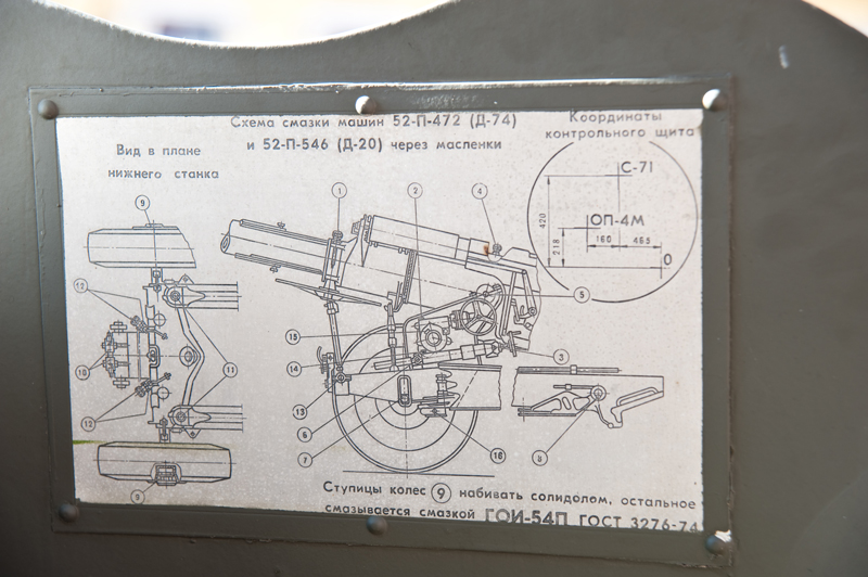 Izložba ratne tehnike iz Domovinskoga rata, iz fundusa Vojnoga muzeja MORH-a. Izložba se održava povodom dvadeset godina hrvatske neovisnosti i dvadesete obljetnice ustrojavanja Zbornog područja Rijeka.